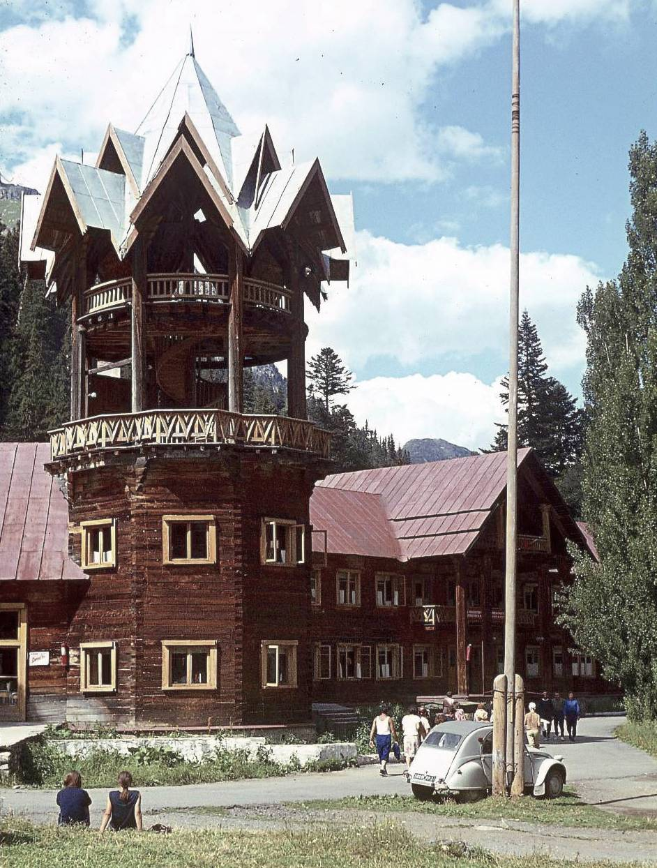 История «Солнечной долины» — началась еще в 1935 году, она была построена без единого гвоздя согласно давним русским традициям, как база Комиссии содействия советским ученым. Годы спустя она была реконструирована и переименована в «Солнечную Долину». В настоящее время гостиница «Солнечная долина» — одна из числа самых уютных и комфортабельных в Домбае, в которой созданы все удобства для гостей. Это два трехэтажных корпуса общей вместимостью до 200 человек. 07-05-2016 По неустановленым пречинам гостиница сгорела до тла.